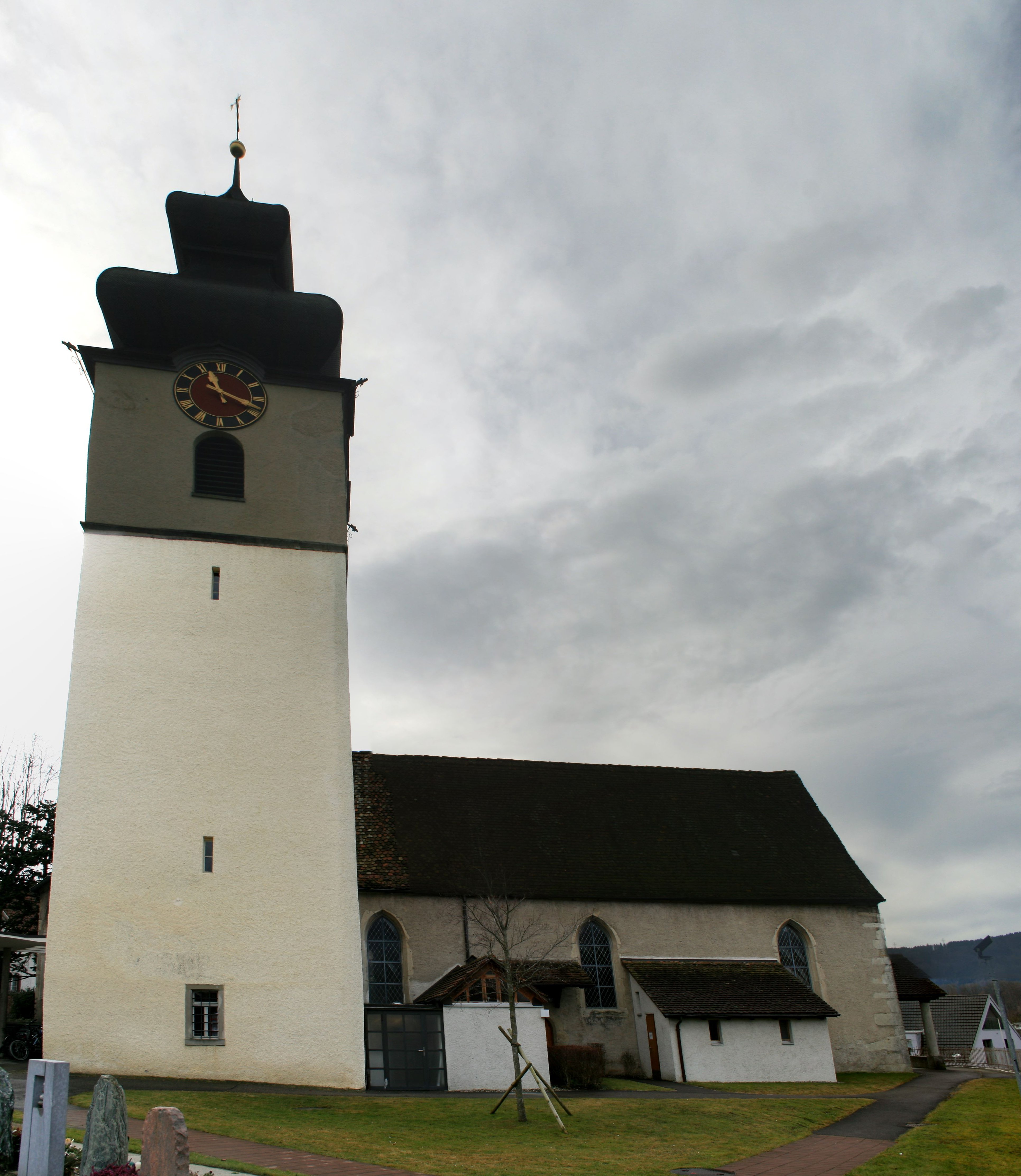 Würenlos